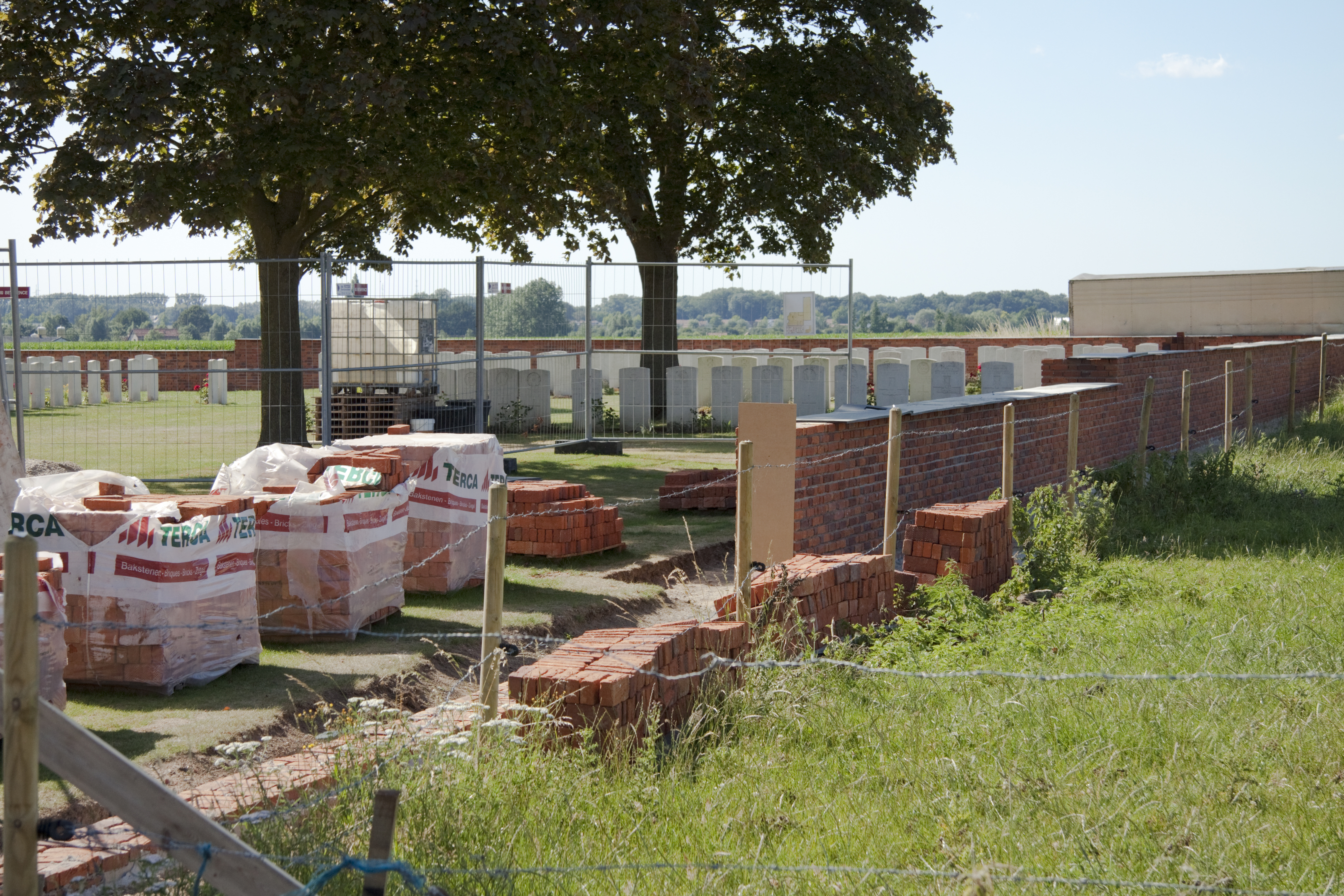 Chester Farm Cemetery. Werken in uitvoering.